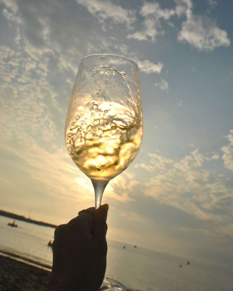 와인잔 투명